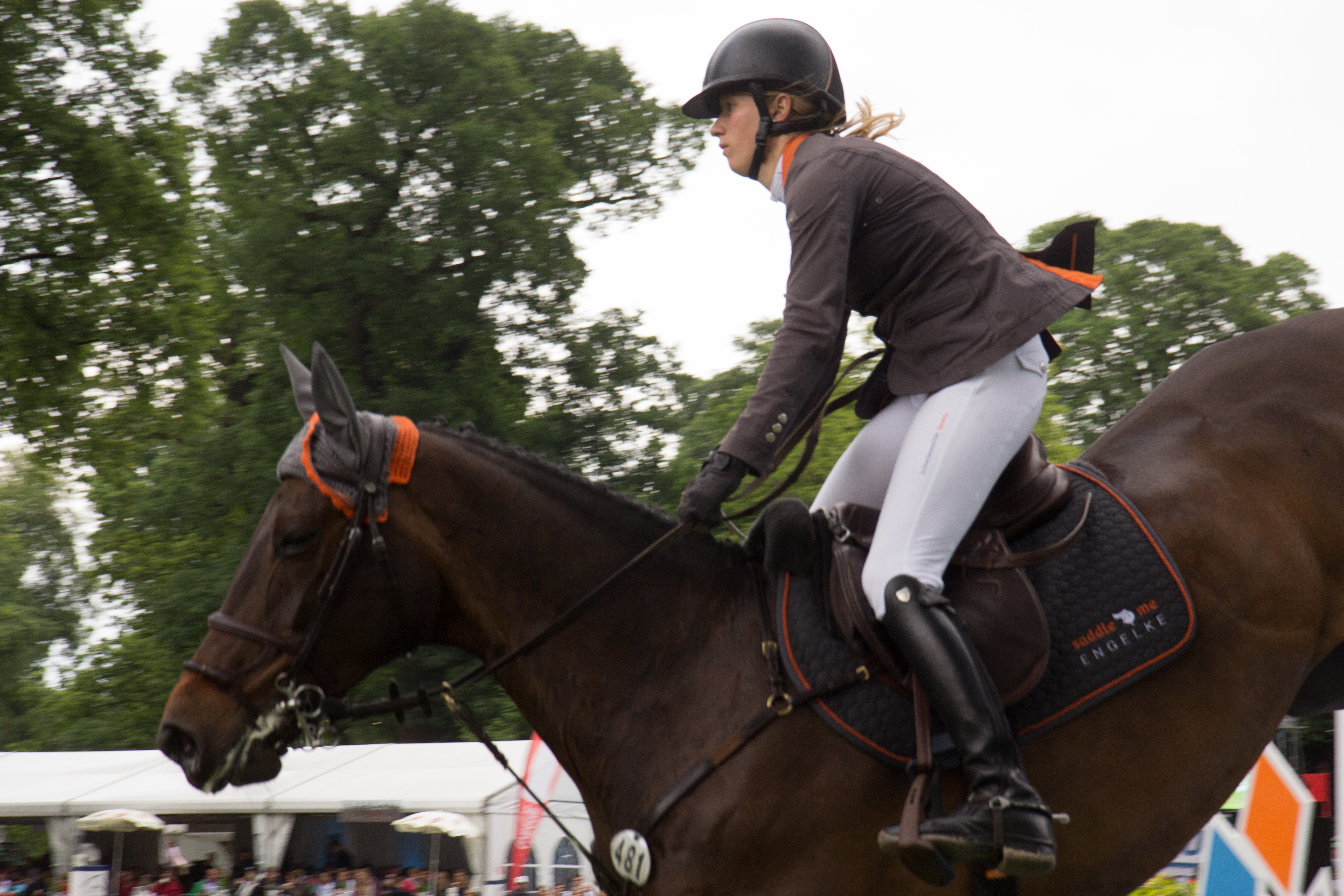 Internationales Wiesbadener Pfingstturnier 2018. CSI 4* Springprüfung KI.S *** m. Stechen (1,50m) "Preis des Hessischen Ministerpräsidenten": Sandra Auffarth auf Landlord